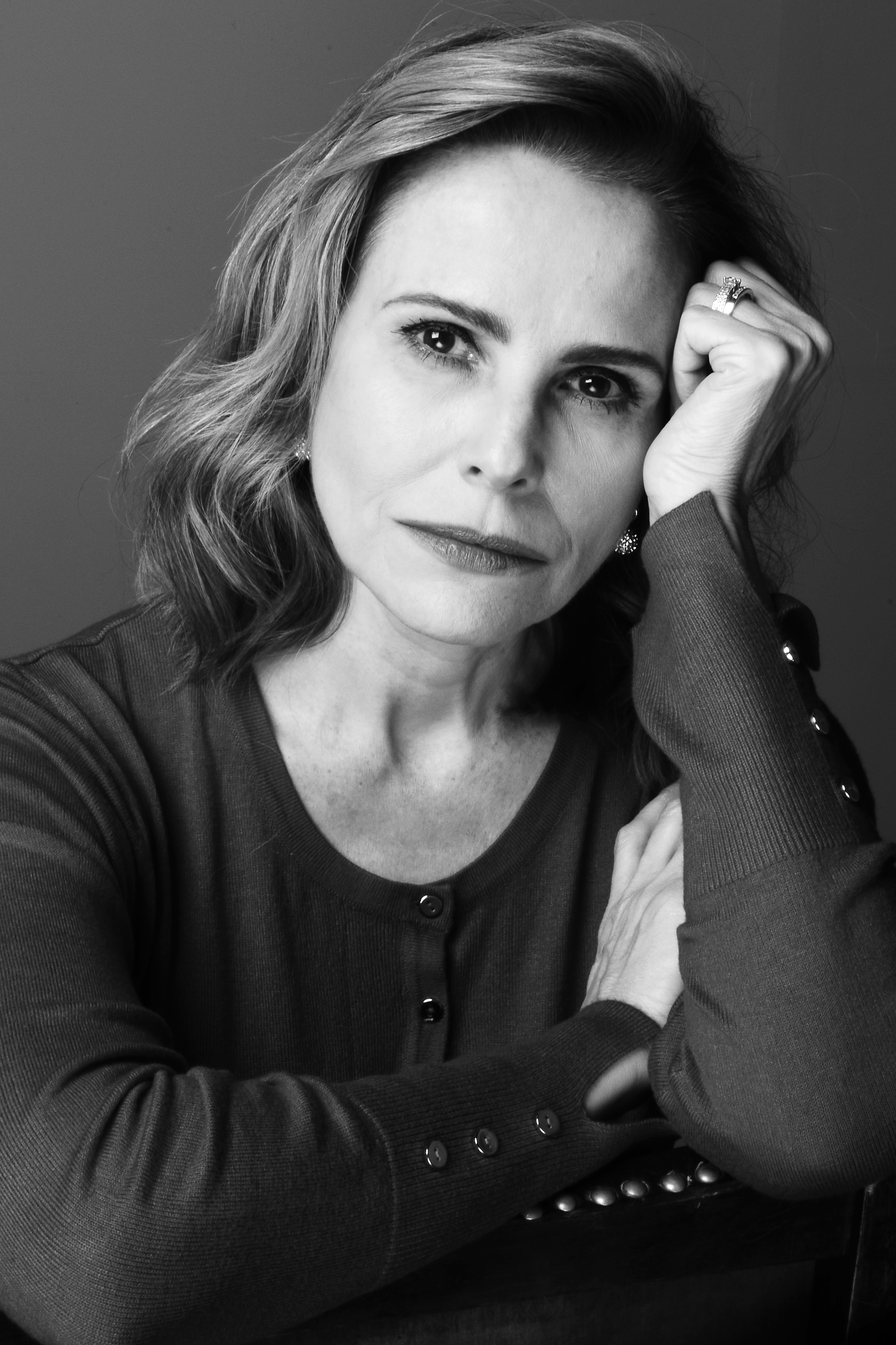 Foto divulgação da atriz Bia Seidl